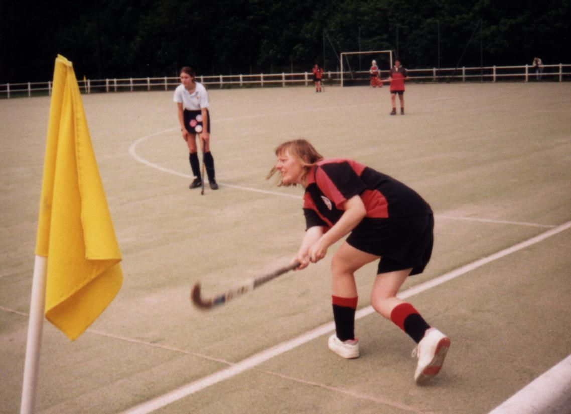 Brenda Bulman, ex-defensora de las inferiores de Belgrano Athletic (Buenos Aires, Argentina), ejecuta una salida lateral. Al fondo, Solange Zimmermann. Partido Standard Athletic Club vs. British School of Paris, jugado en el Racing Club de France, Versailles, 1996.